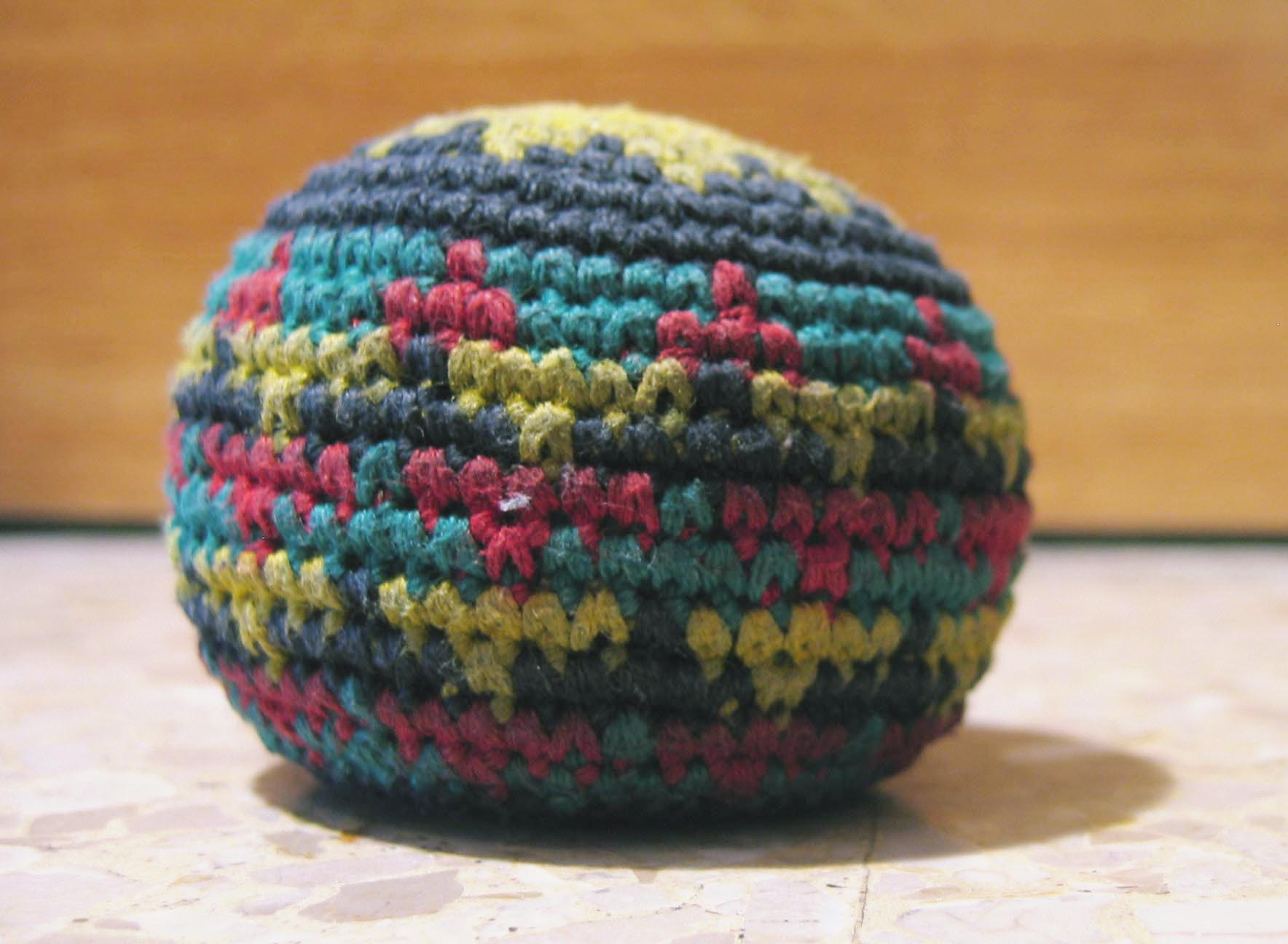 Hacky bag